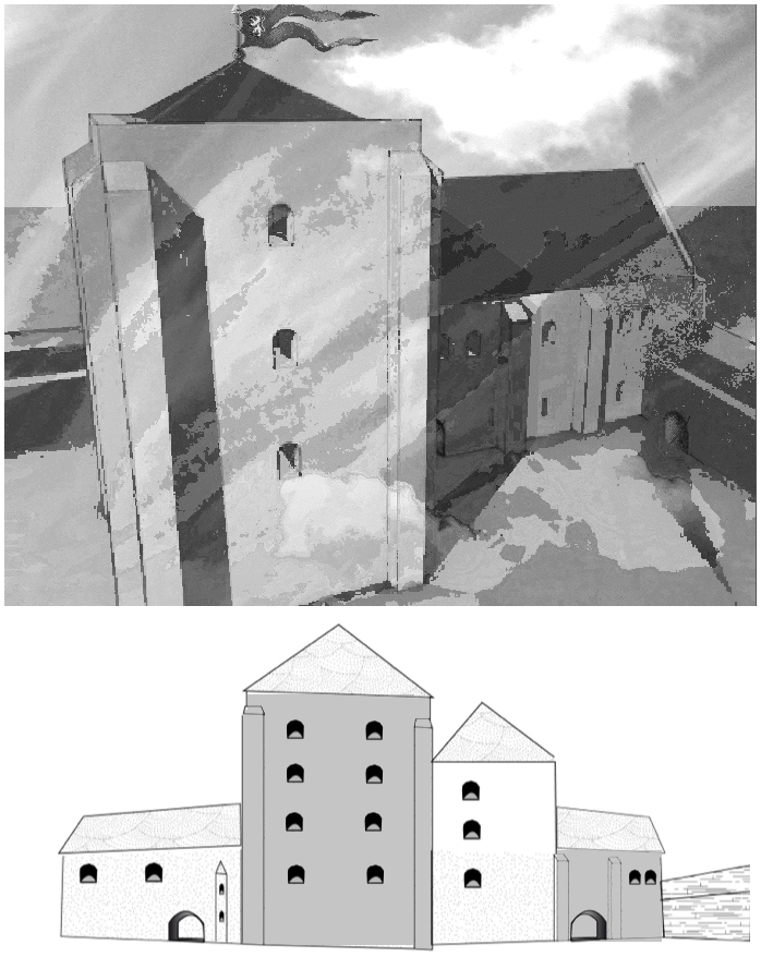 Restitution de l'évolution du château de Tours entre le 11° et le XIII° siècle selon Henri Galinié (dessin de Alain Darles) et Vassy Malatra (dessin de Vassy Malatra) 1er dessin : Représentation d'artiste du château de Tours tel qu'il pourrait avoir été au XI° siècle, ici orienté Sud (gauche) Nord (droite). Dessin personnel d'après la reconstitution graphique originale faite par l'équipe ayant effectué les fouilles du château dans les année 1974-1978 (Henri Galinié et Thierry Morin, LAT) 2ème dessin : Hypothèse de restitution de la résidence royale (château de Tours) au XIII° siècle, selon Vassy Malatra, Le château royal de Tours, son histoire, son intérêt (sous dir. Alain Salamagne), Mémoire Master 2, Arts, Lettres et civilisations, Tours, Université François Rabelais, 2010, 2 vol., p. 210